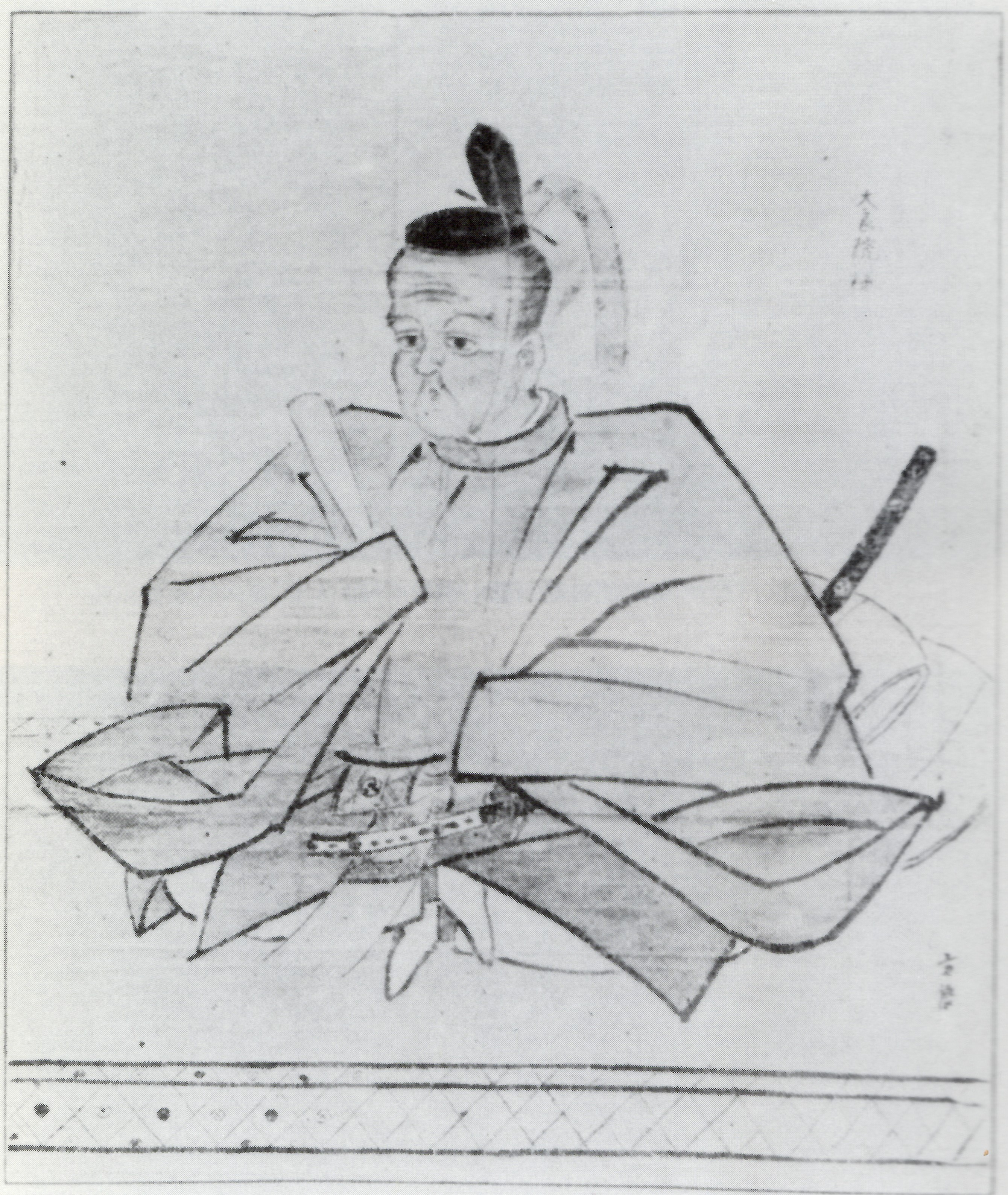 有馬頼徳の肖像。